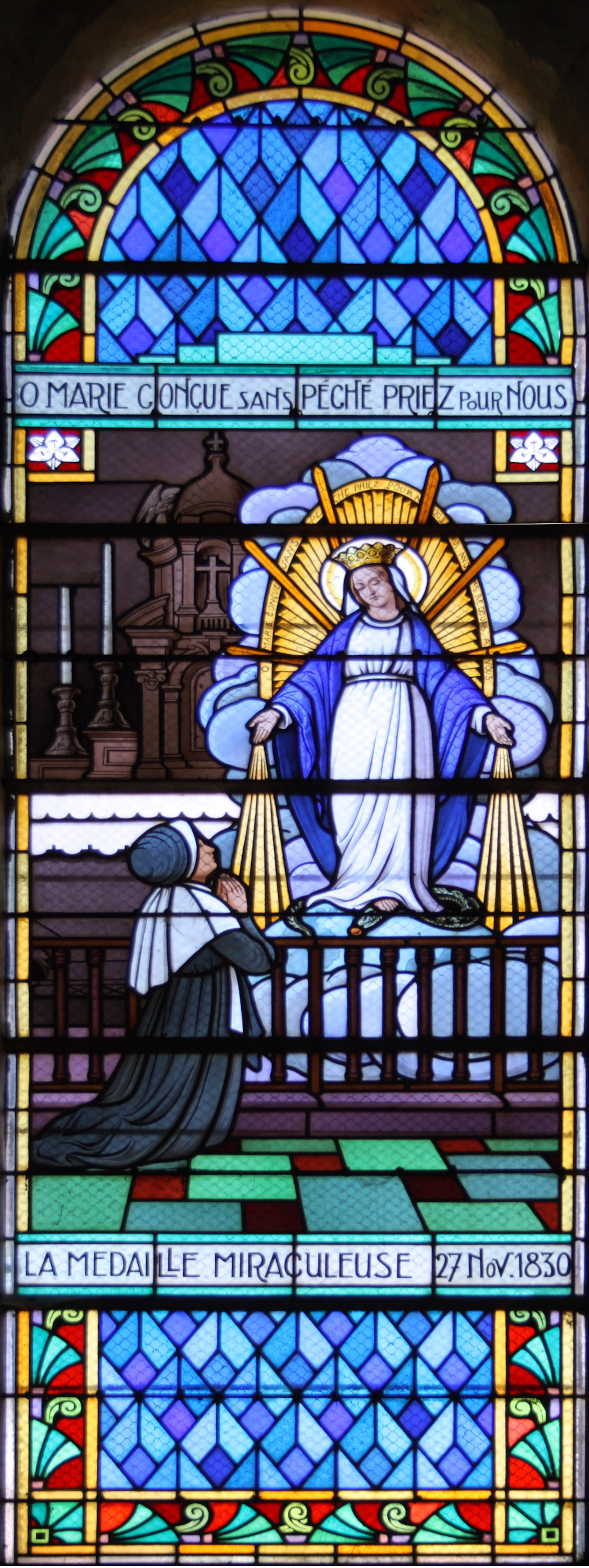 Katholische Pfarrkirche Saint-Martin in Nangis im Département Seine-et-Marne (Île-de-France/Frankreich), Bleiglasfenster, Darstellung: Marienerscheinung der Catherine Labouré (Médaille Miraculeuse)